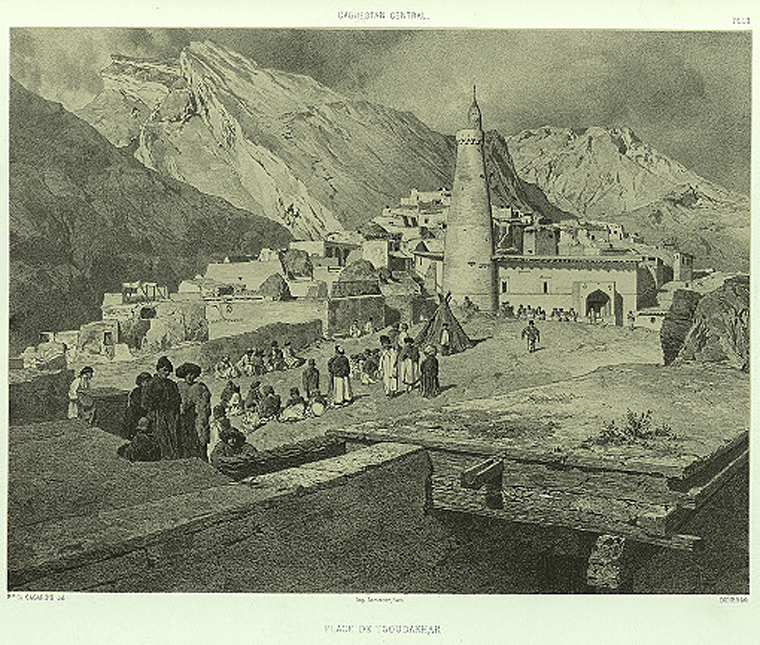 Daghestan central. Place de Tsoudakhar.